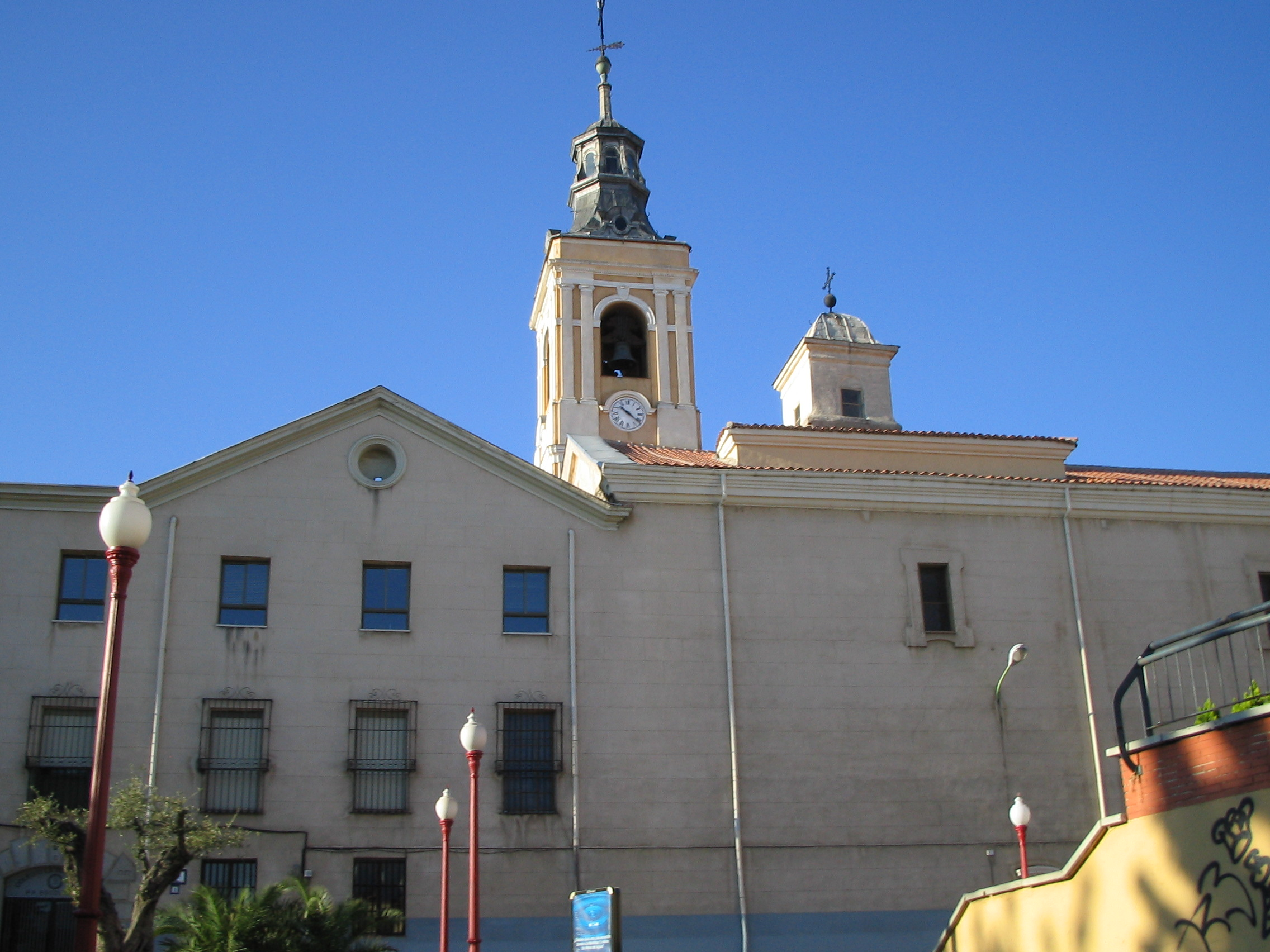 Monumento de Getafe